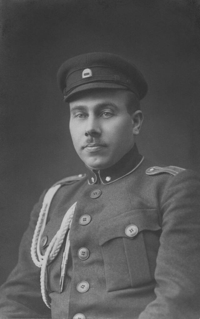 Johannes Poopuu 1920. aastal.